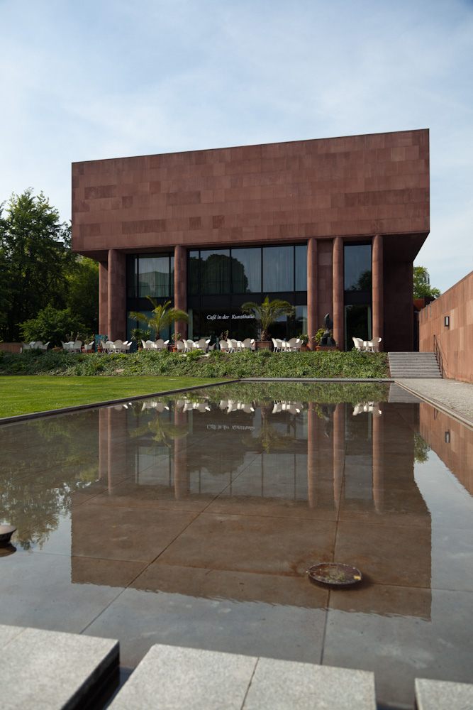 Kunsthalle Bielefeld